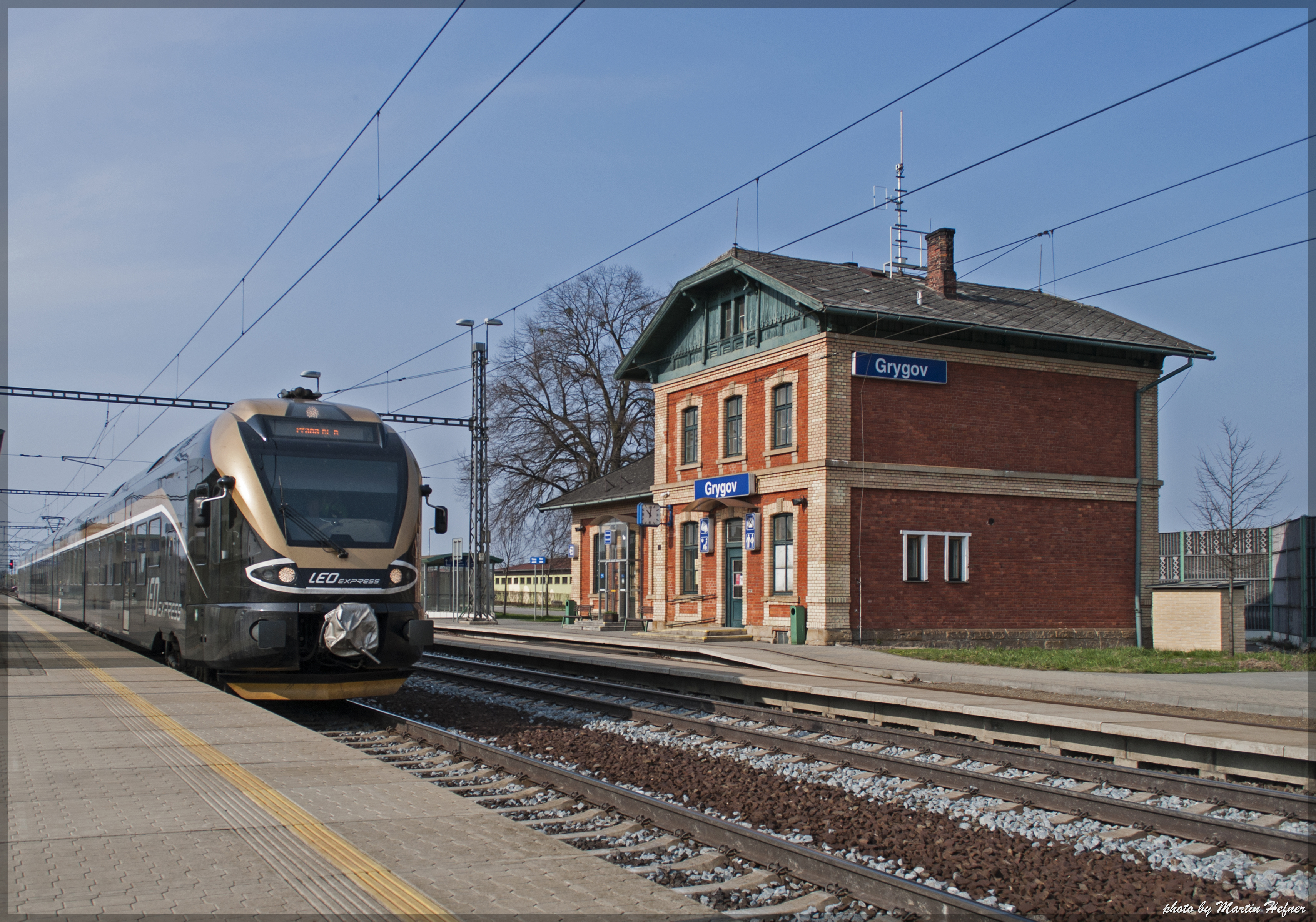 Elektrická jednotka řady 480 dopravce Leo Express, Grygov, okres Olomouc